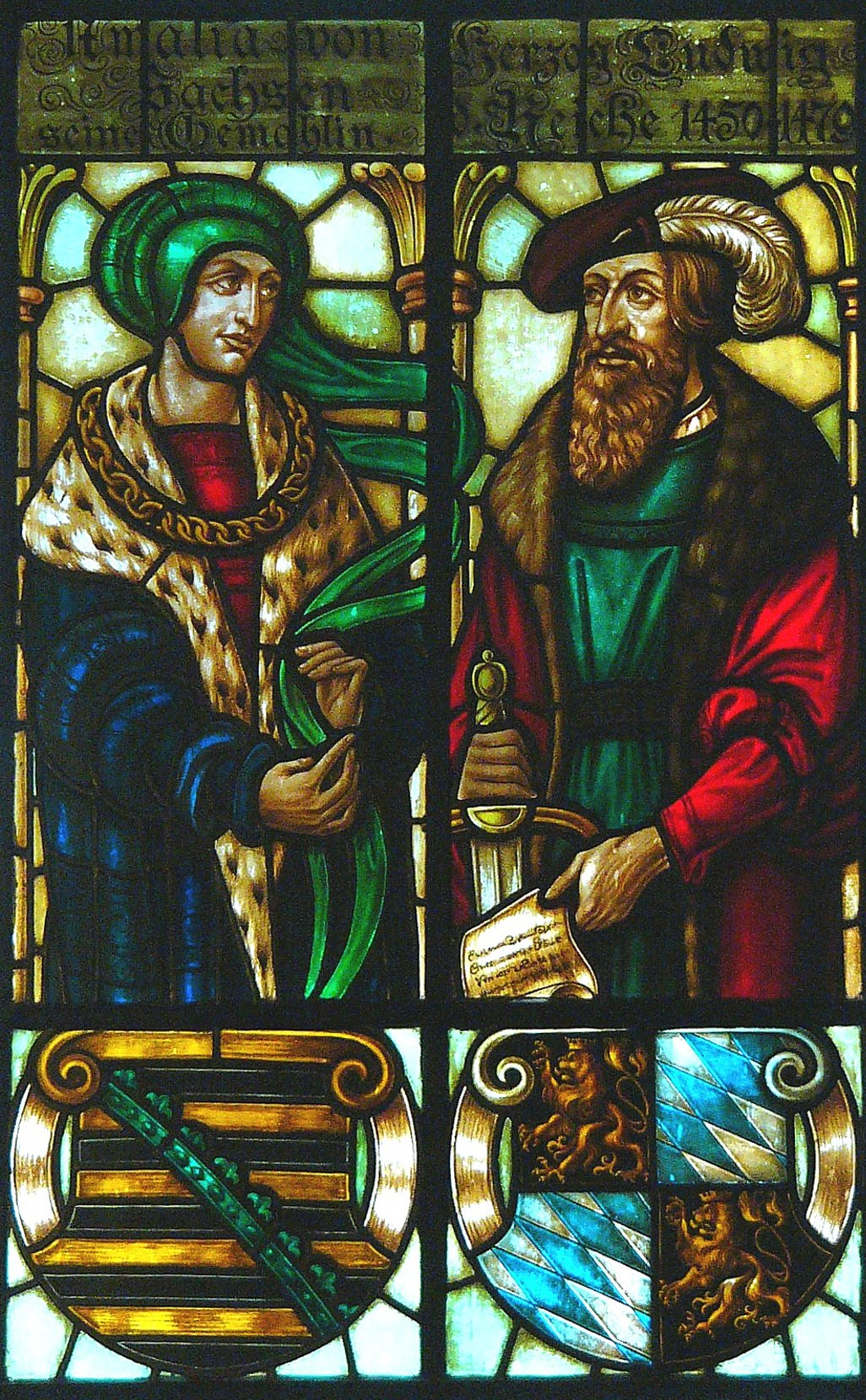 Landshut, Altstadt 315, Rathaus. Fenster in Haupttreppenhaus. Dargestellt sind Amalia von Sachsen und Ludwig der Reiche.This is a photograph of an architectural monument.